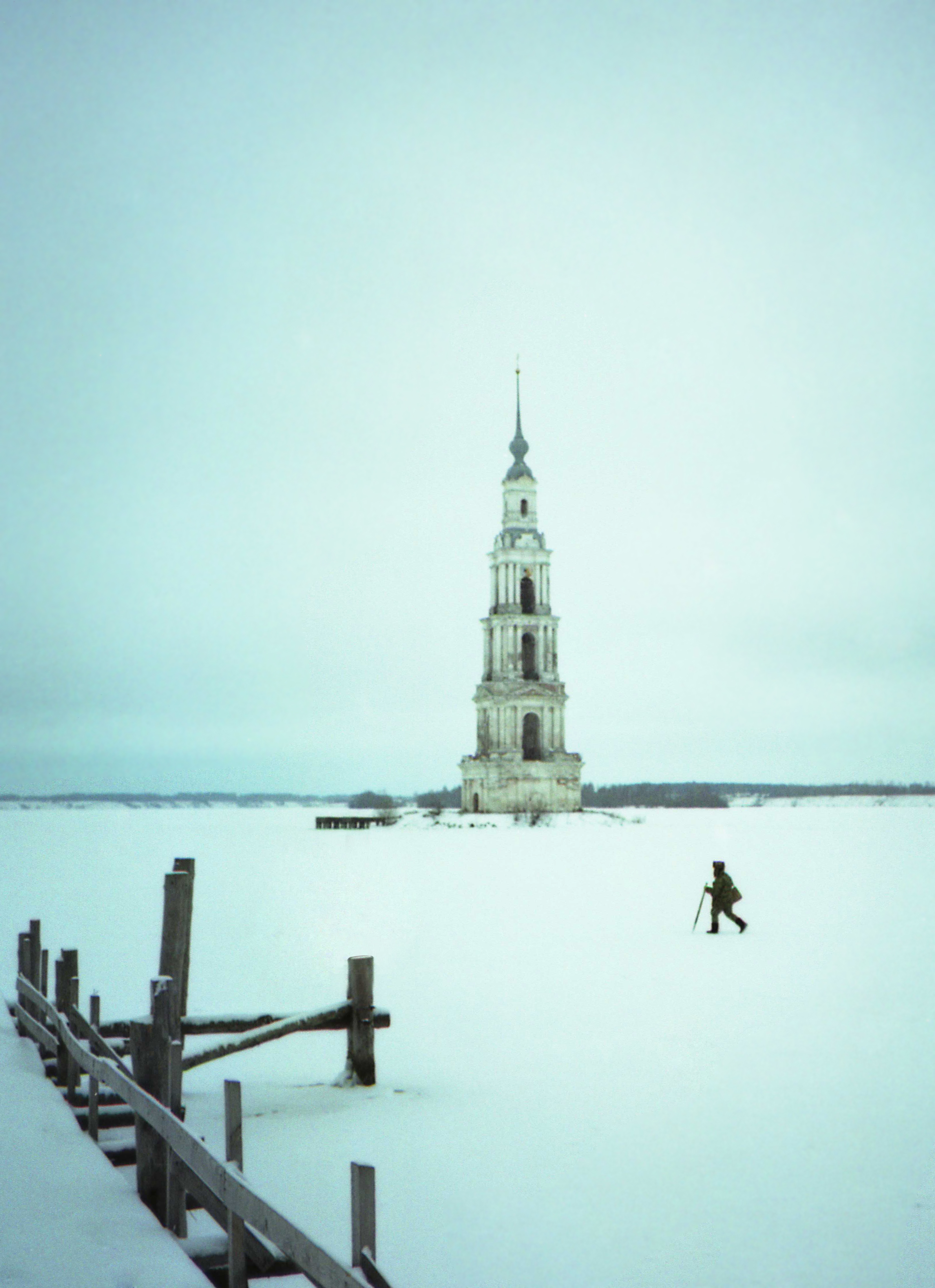 Kalyazin, winter, 2005